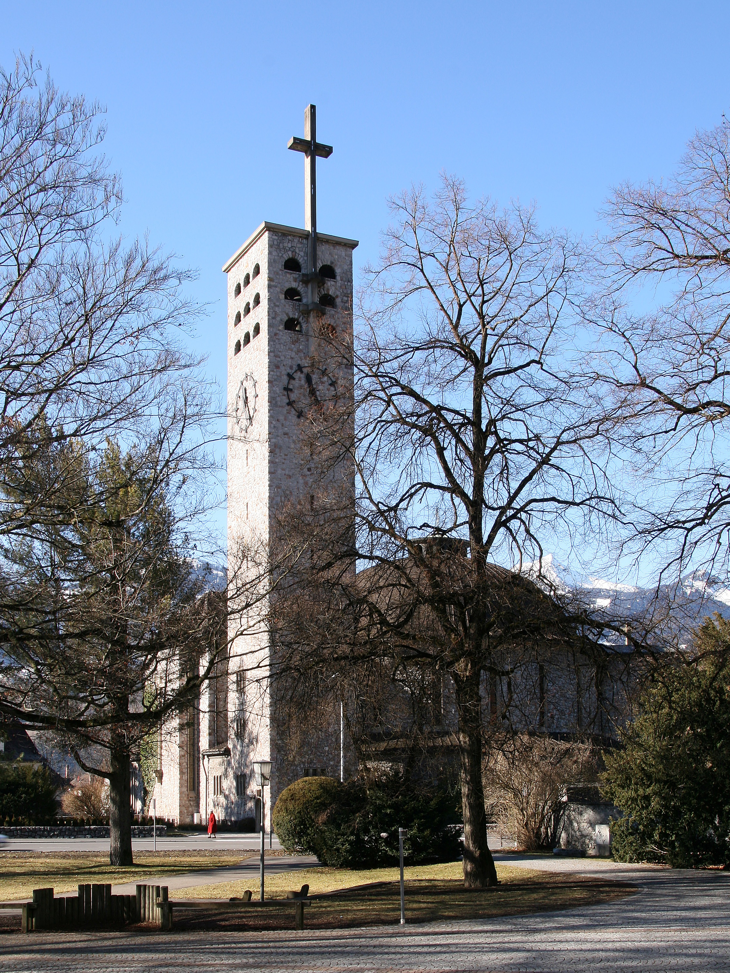 aus dem DEHIO Vorarlberg 1983: Stadtpfarrkirche Hl. Kreuz, Zentralbau nach Plan von Albert Otto Linder 1932-34 in Bludenz, Vorarlberg